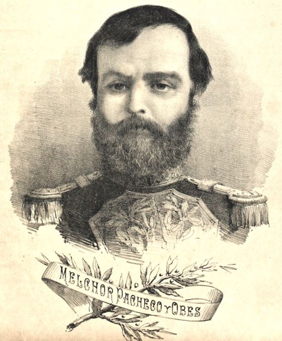 Melchor Pacheco y Obes grabado aparecido en el número 34 de El Indiscreto el 18 de enero de 1885